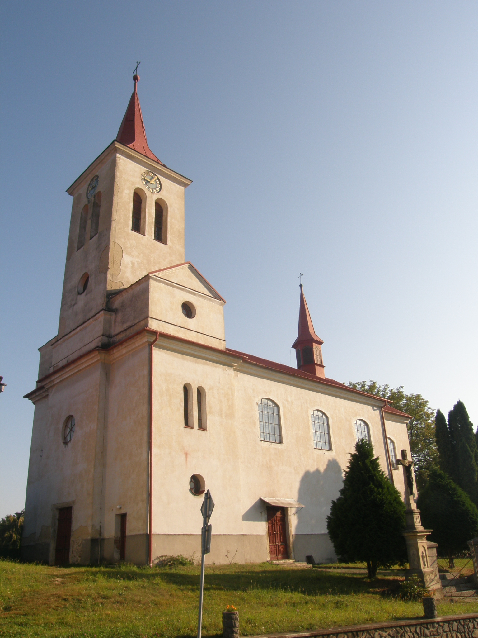 Kostel svatého Michala v Roztání na Prostějovsku